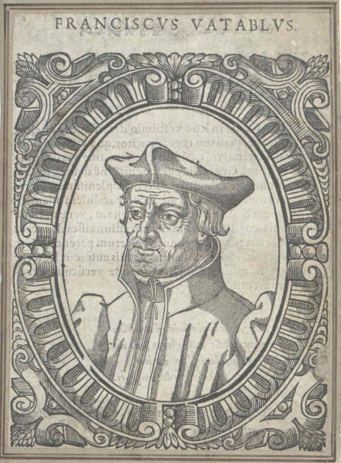 François Vatable, grabado en Théodore Bèze, Icones, 1581. Ósterreichische Nationalbibliothek